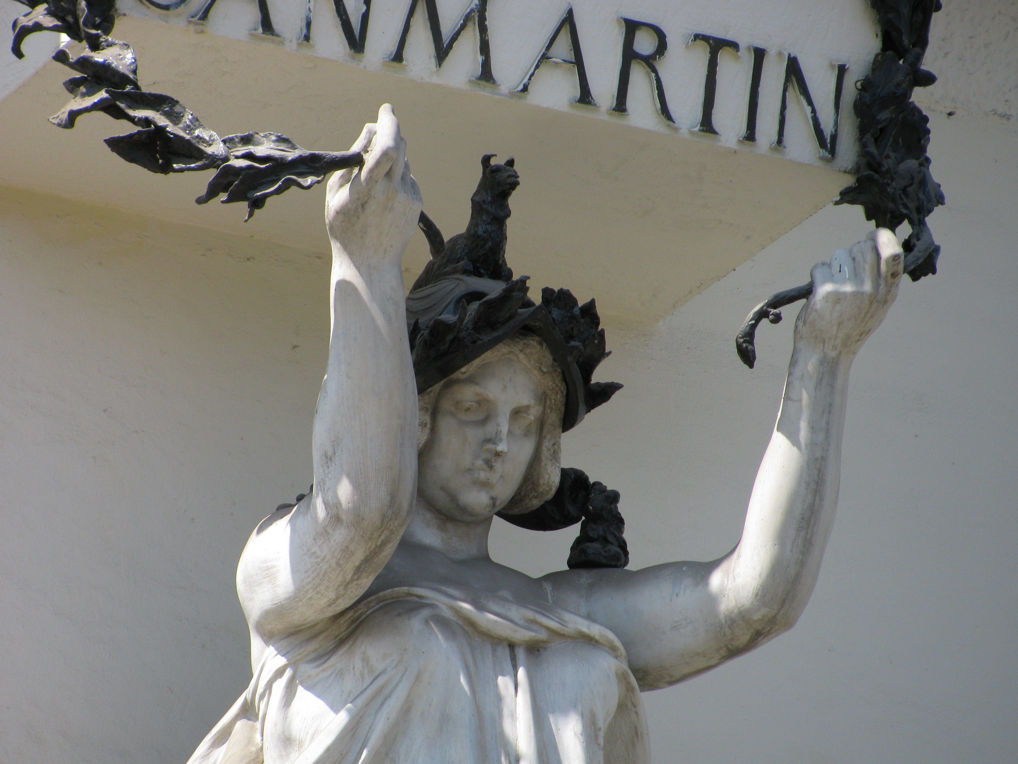 Llama hat